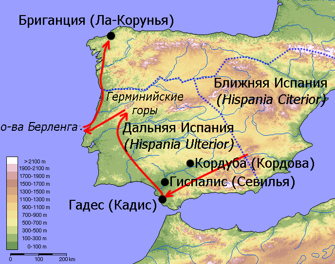 Действия (преимущественно военные) Гая Юлия Цезаря в провинции Дальняя Испания (61 год до н. э.). В скобках даны современные названия древних городов.